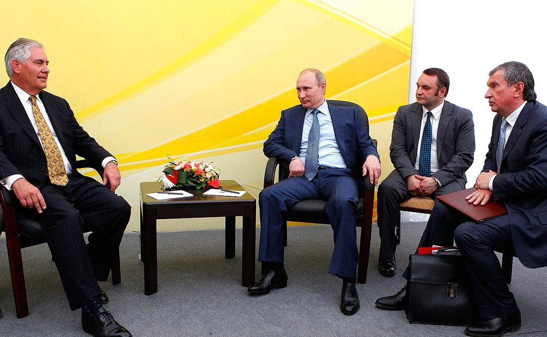 Президент России Владимир Путин с председателем Совета директоров компании «ExxonMobil» Рексом Тиллерсоном. Крайний справа – президент, председатель правления компании «Роснефть» Игорь Сечин